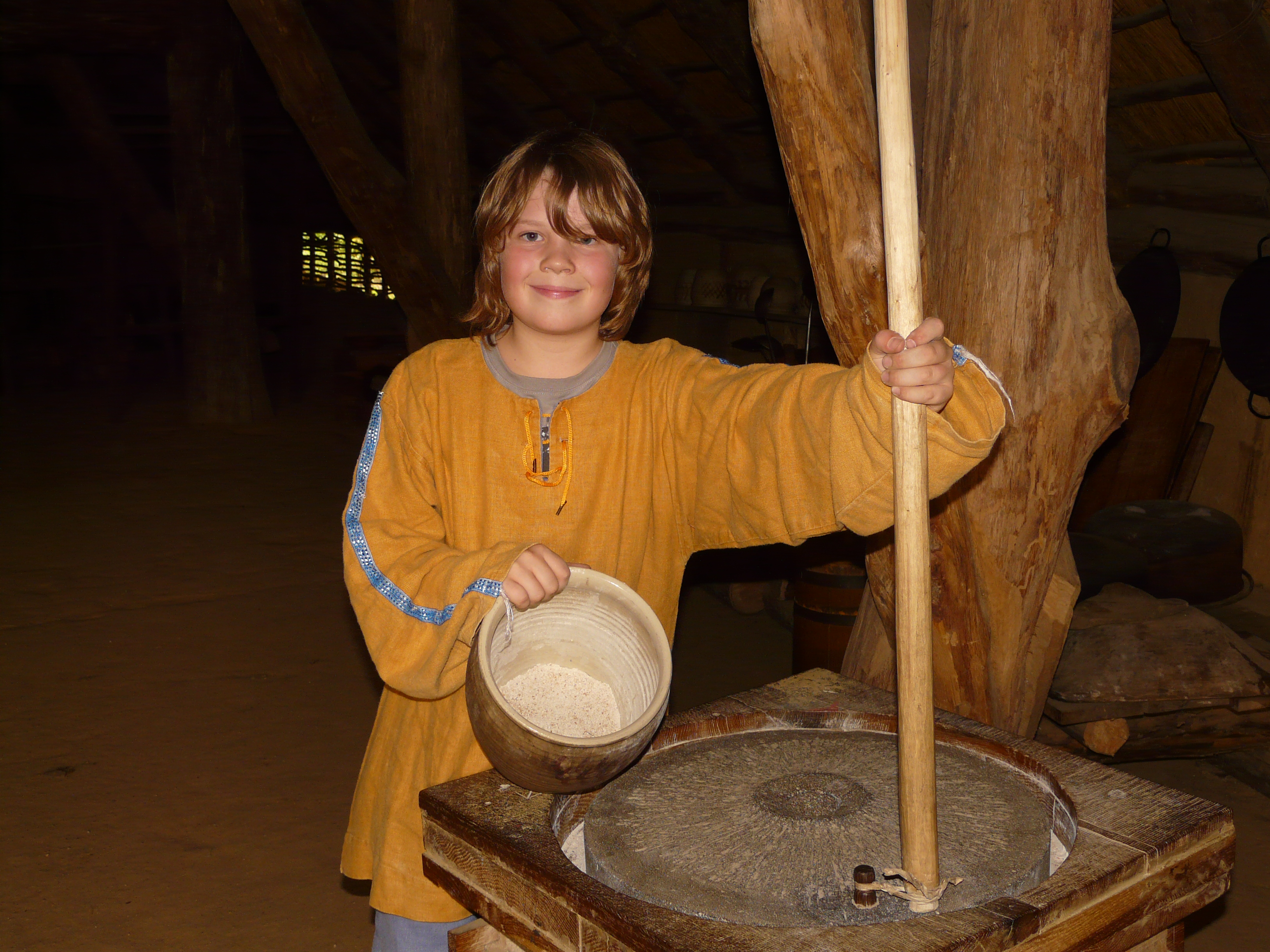 Korn mahlen auf mittelalterliche Weise im Historisch Openluchtmuseum Eindhoven